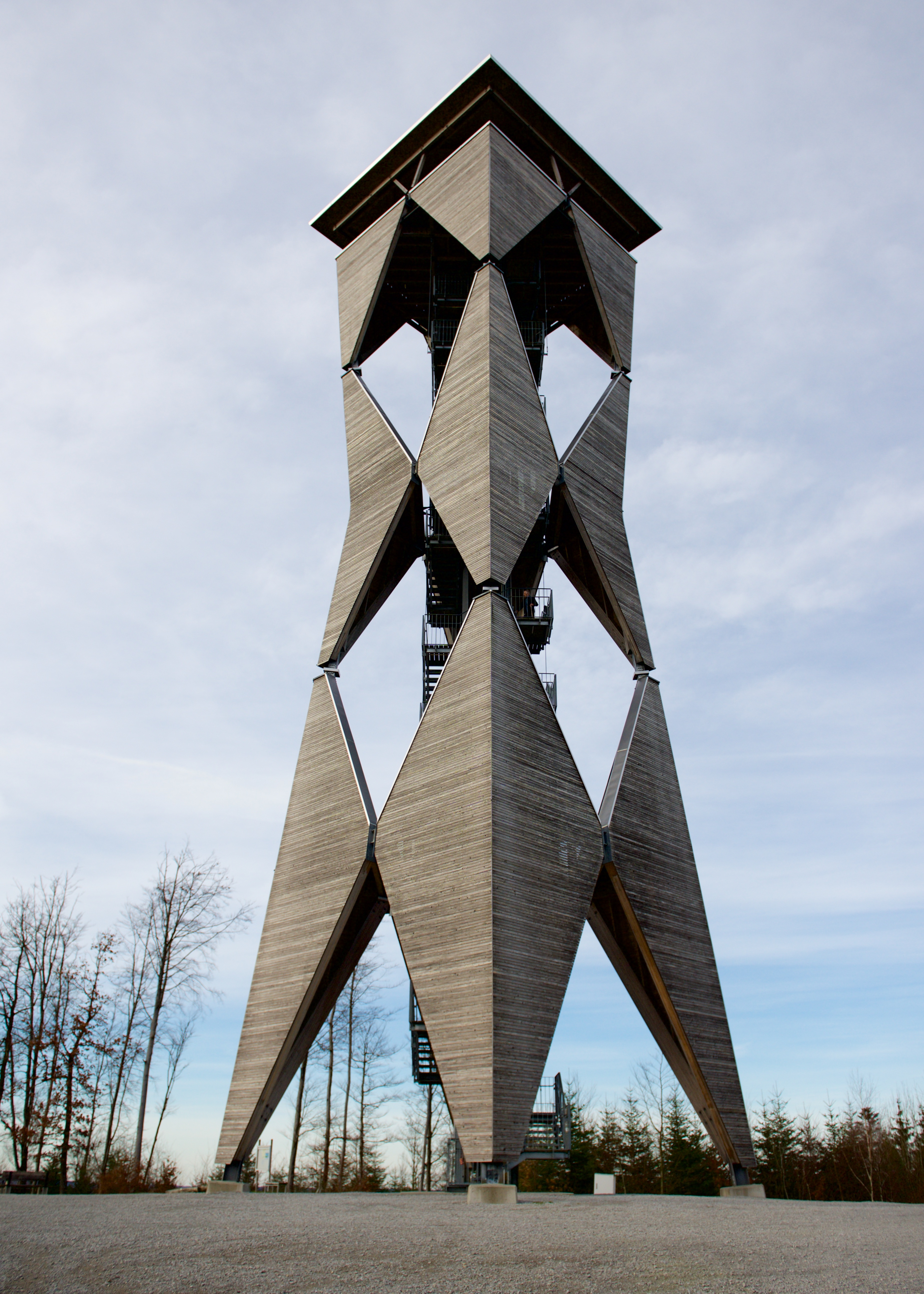 Altenbergturm